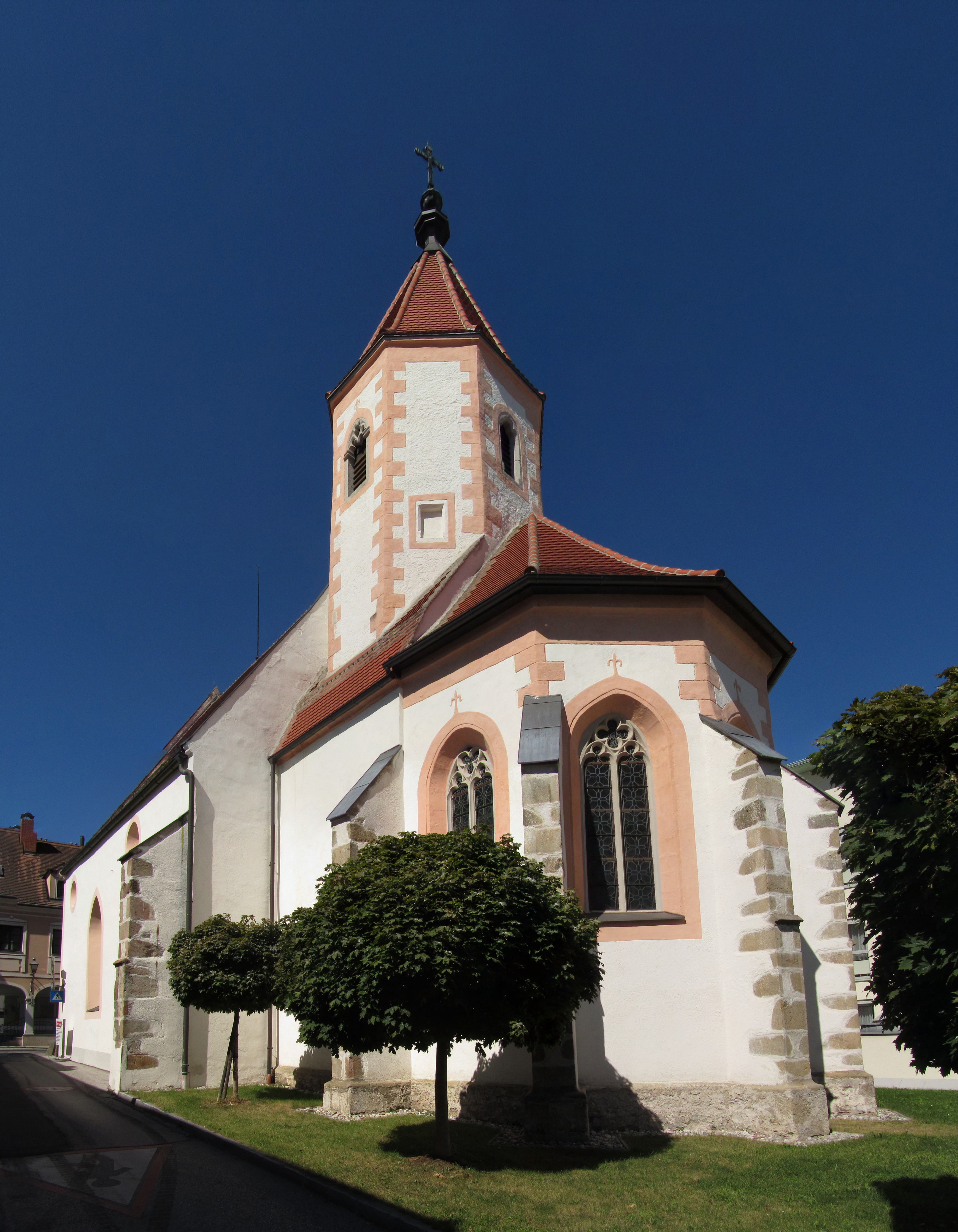 1438–1448 errichteter Nachfolgebau der ehemaligen Martinskirche; zusammen mit dem Bürgerspital von Mauer umgeben.